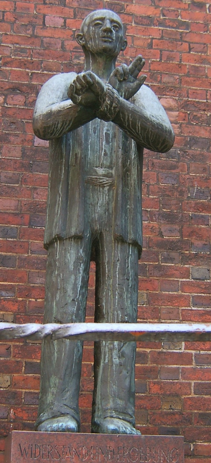 Bonhoeffer-Skulptur an der Petrikirche in Hamburg-AltstadtThis is a photograph of an architectural monument.